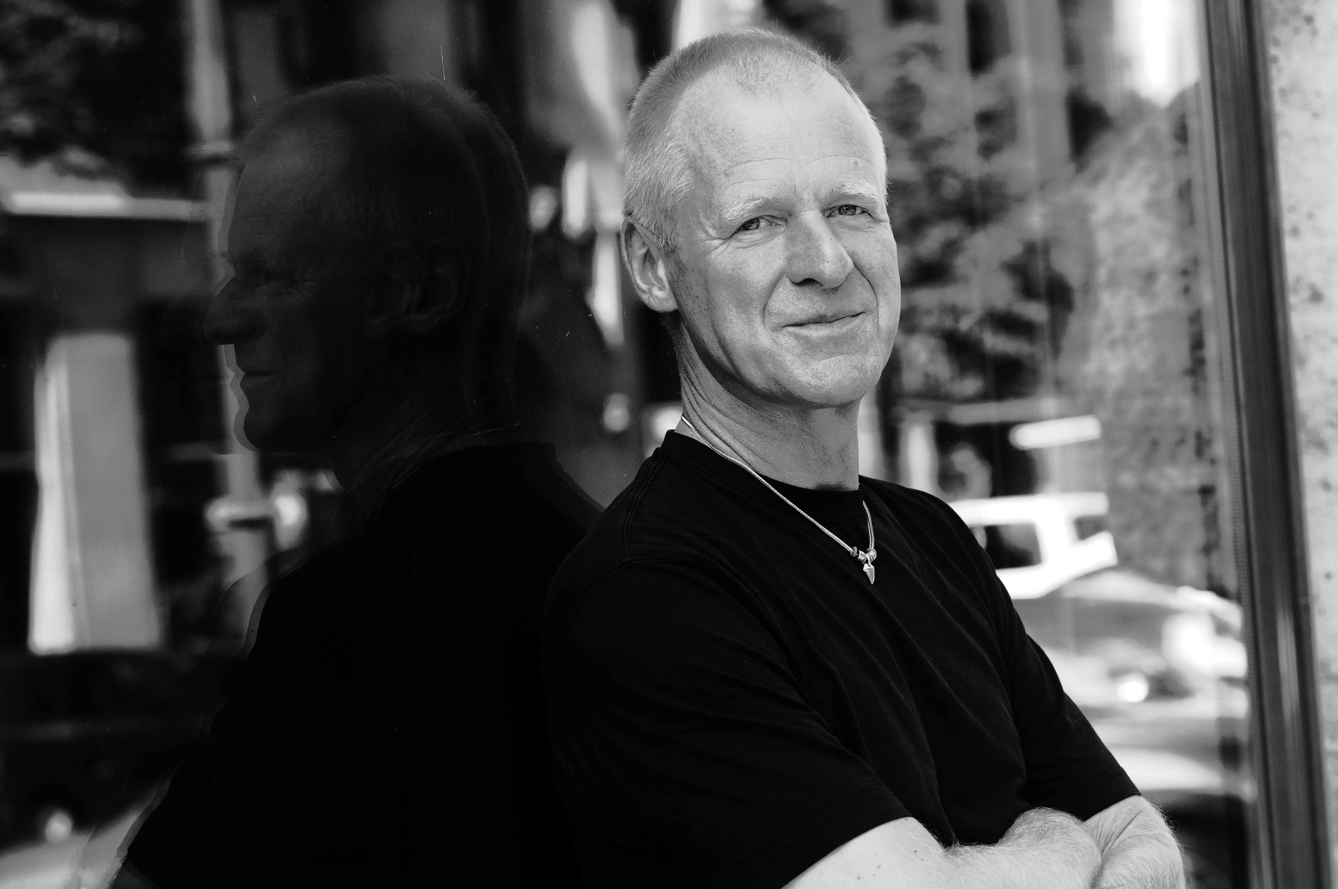 Prof. Dr.-Ing. Matthias Reich, Technische Universität Bergakademie Freiberg